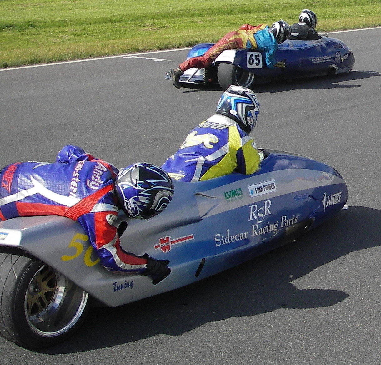 moderne Seitenwagen Rennmaschinen